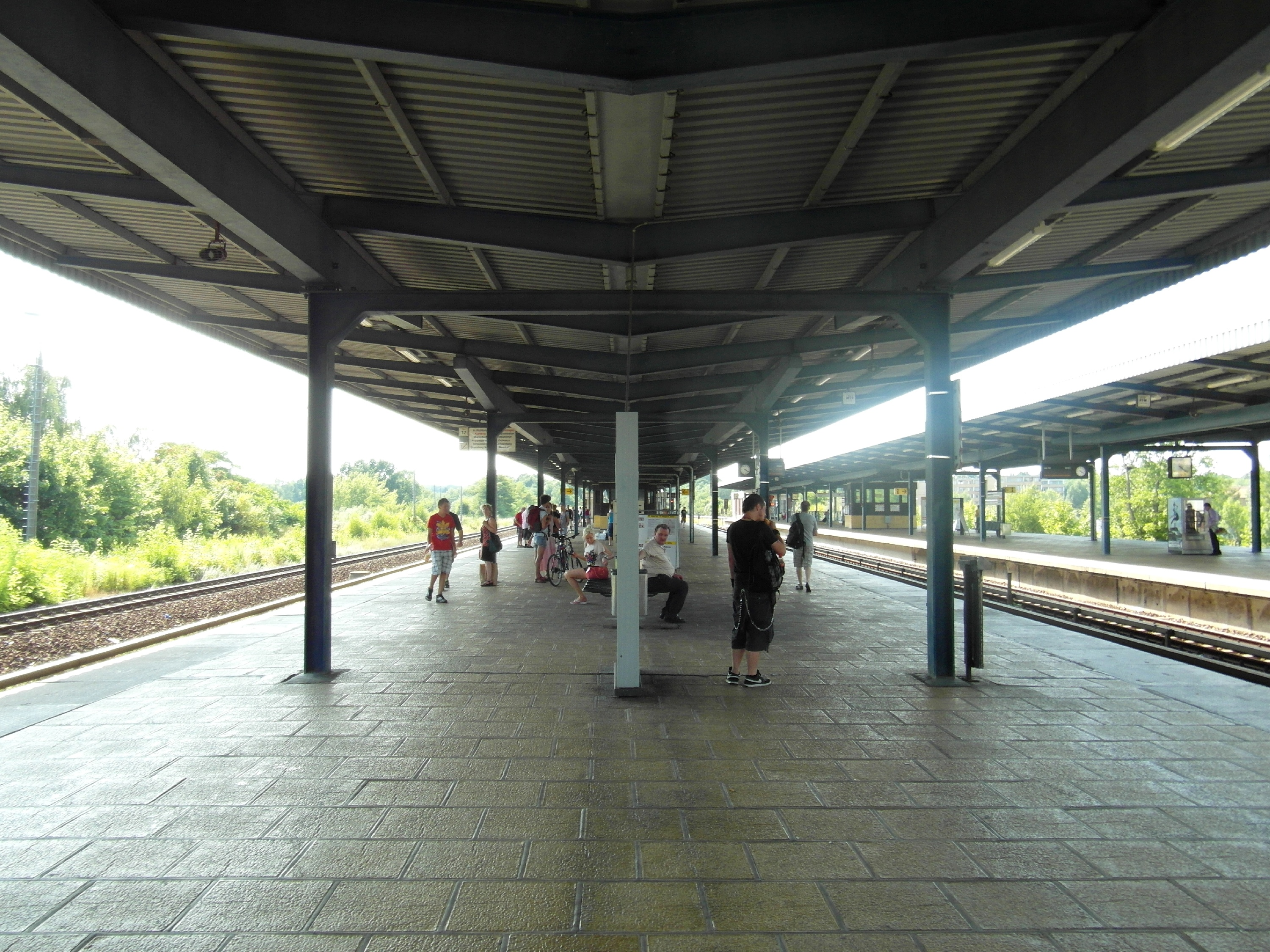 Ein gemeinsamer Bahnhof mit bahnsteiggleichem Übergang zwischen S- und U-Bahn - Linien S5 und U5